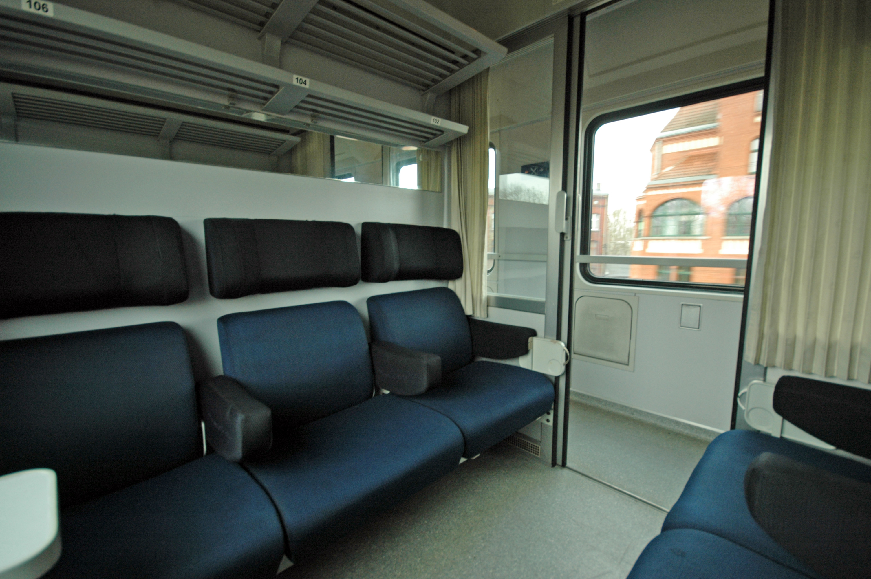 Innenansicht Waggon der tschechischen Bahn České dráhy, Eurocity Szczecin - Prag